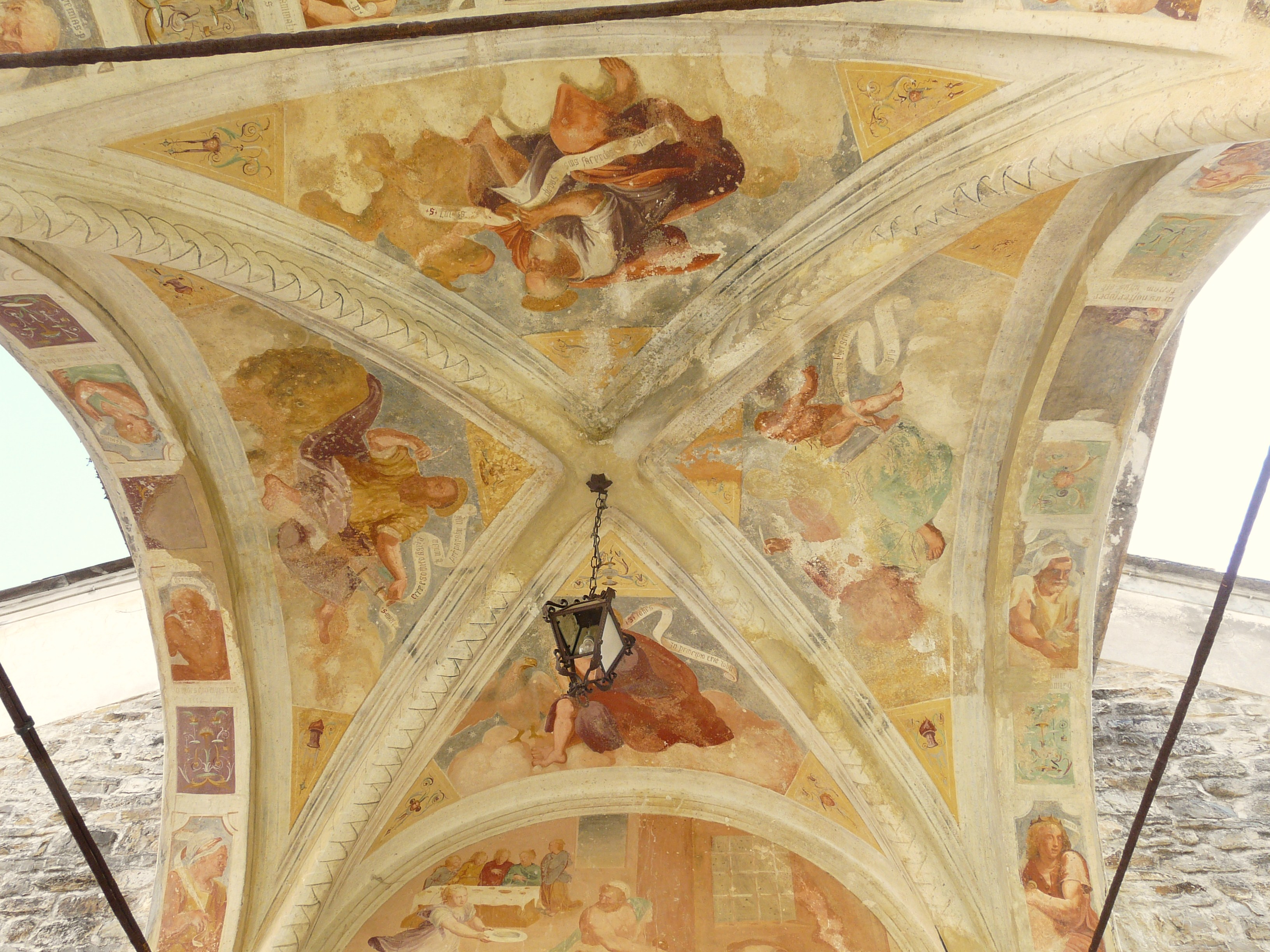 Chiesa di San Giovanni del Groppo, Prelà, Liguria, Italia